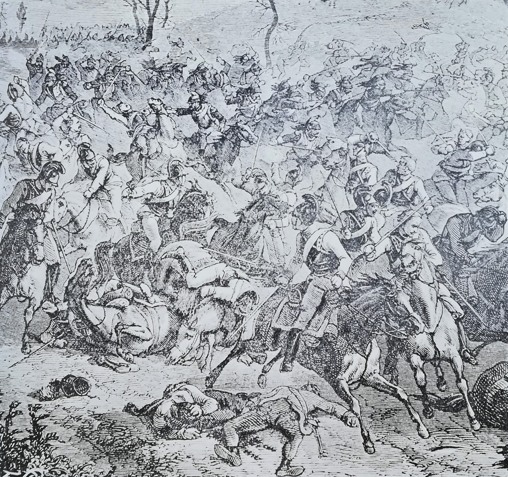 Combat de cavalerie entre cuirassiers français et autrichiens au soir de la bataille d'Eckmühl, le 22 avril 1809. Inférieurs en nombre et dépourvus d'artillerie, les cavaliers autrichiens furent mis en déroute.